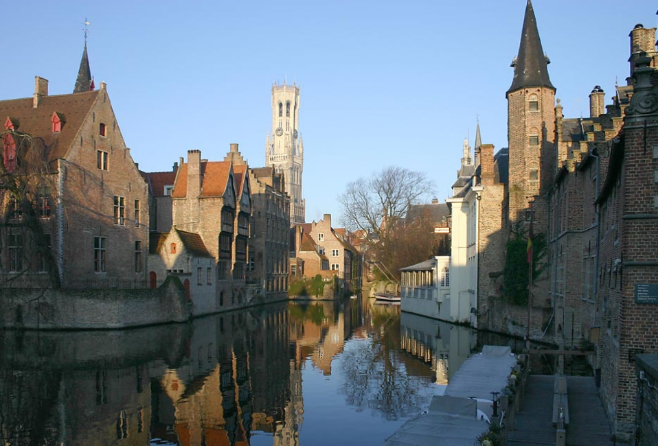 Brügge, Belgium. View from Huidenvettersplein